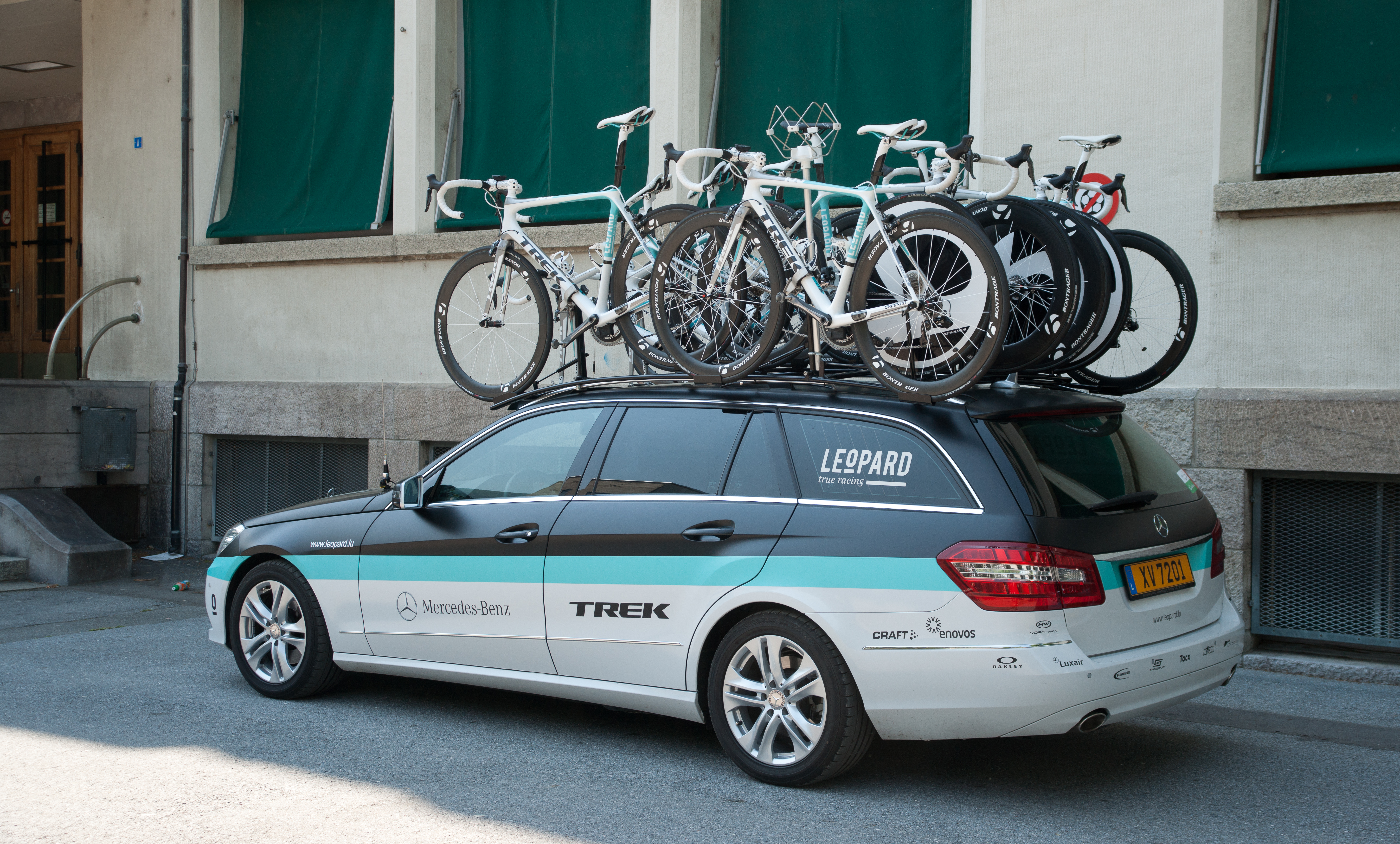 Contre la montre - Romandie 2010